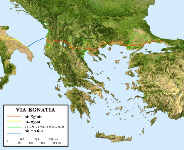 Via Egnatia, Komotini